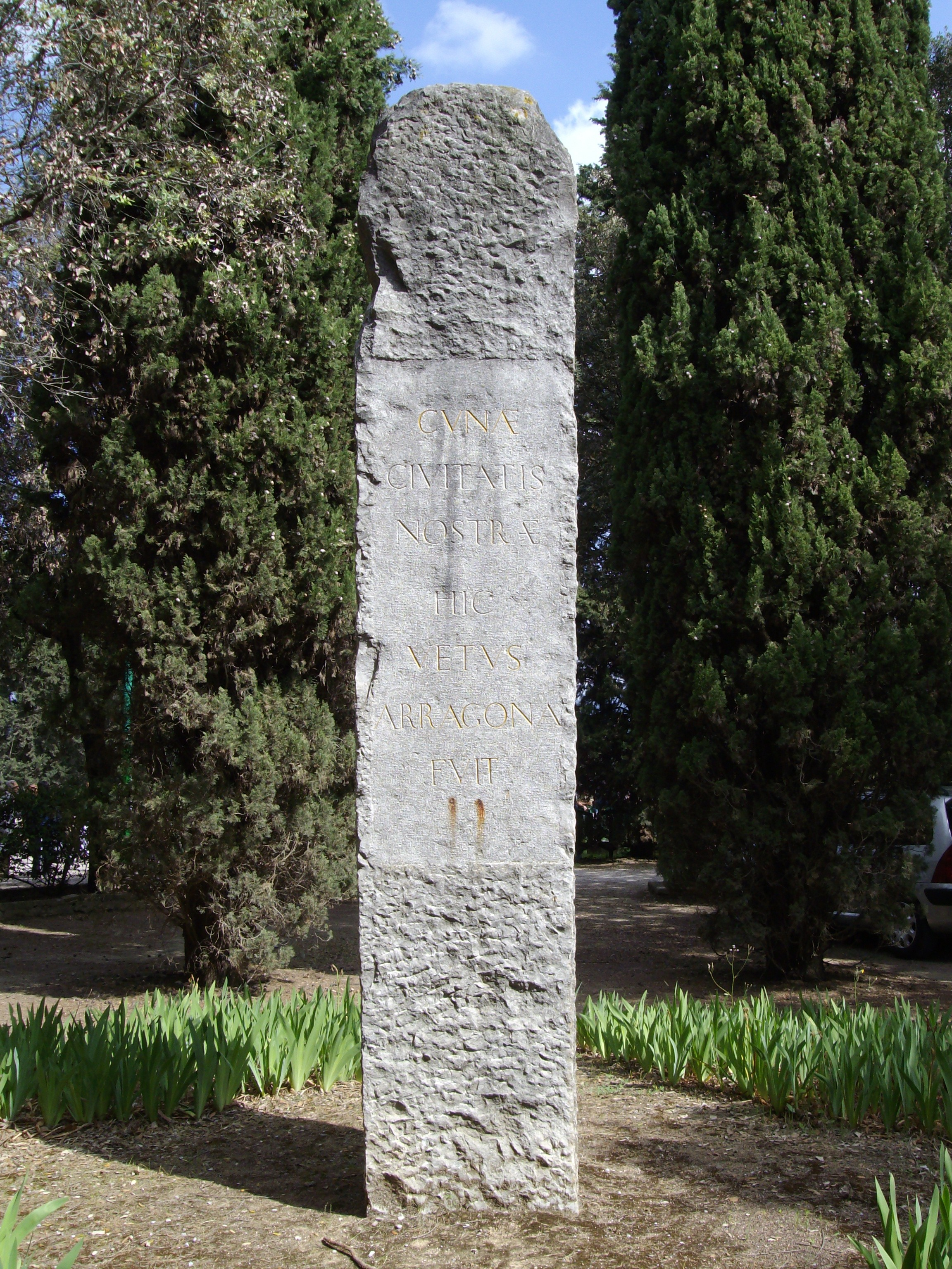 Monumento a la villa romana de Arragona, erigido en 1949 al lado del Santuario de la Mare de Déu de la Salut de Sabadell.